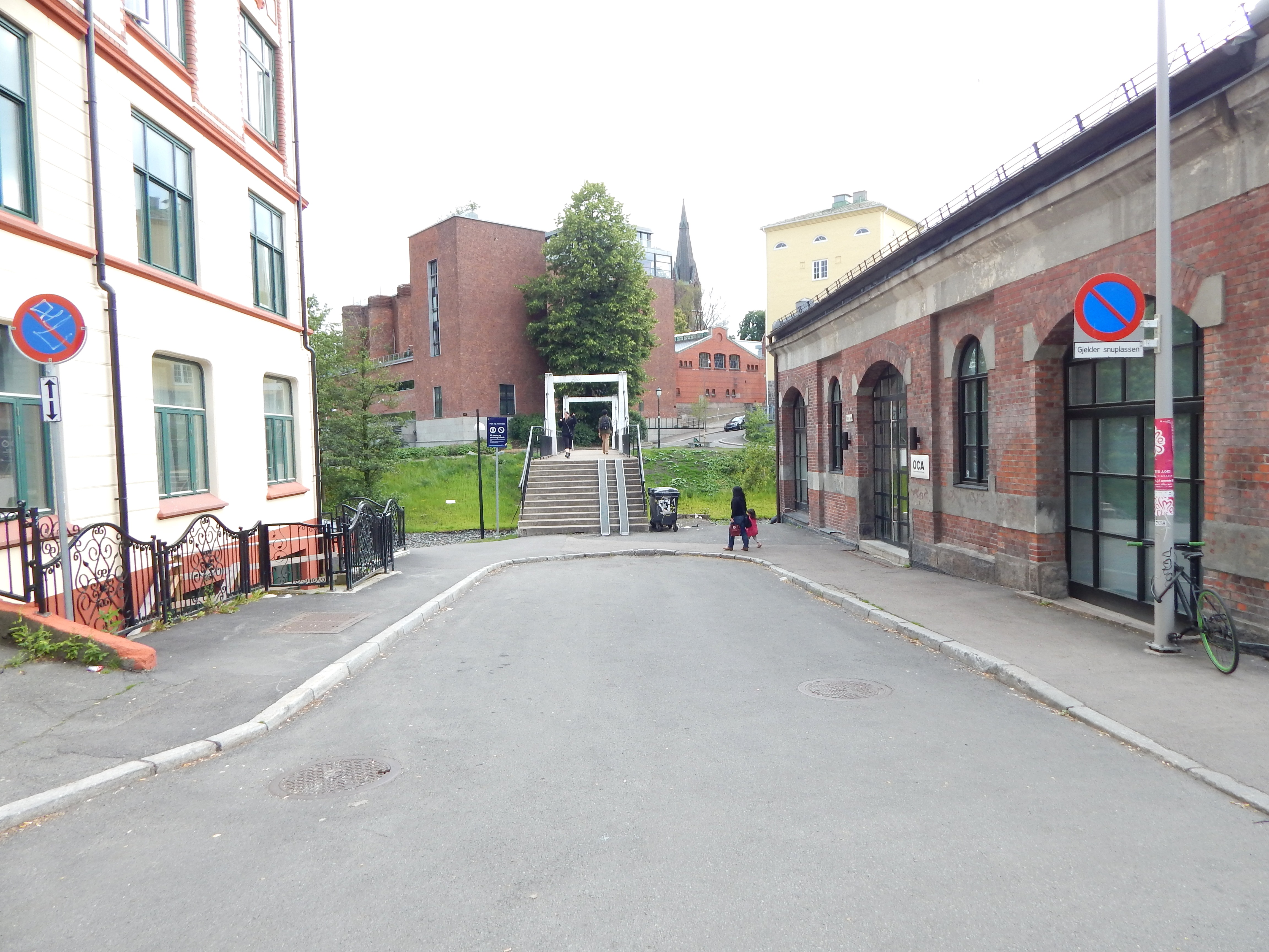 Nedre gate